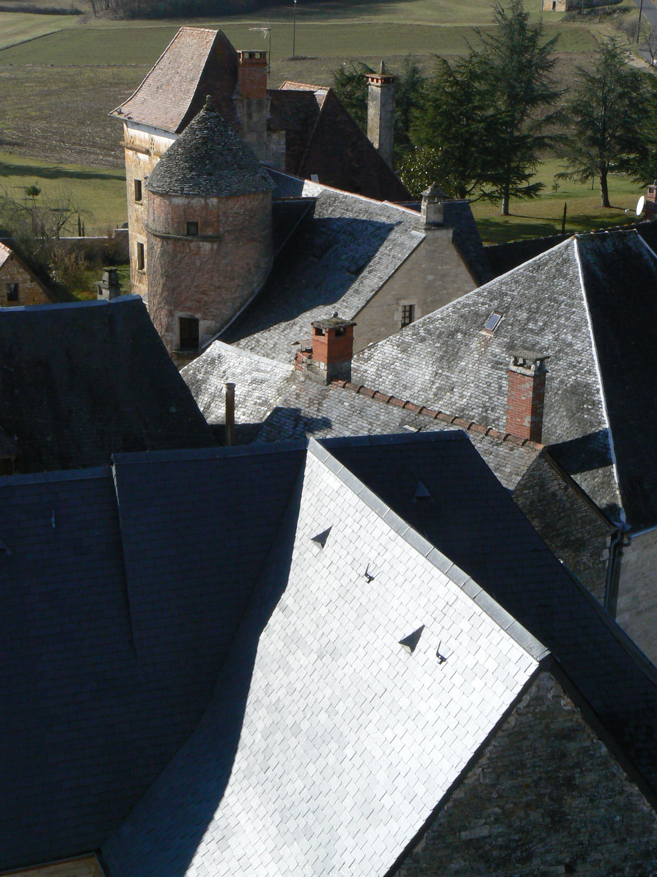 Manoir XVIe et XVIIe siècle de Gignac Lot